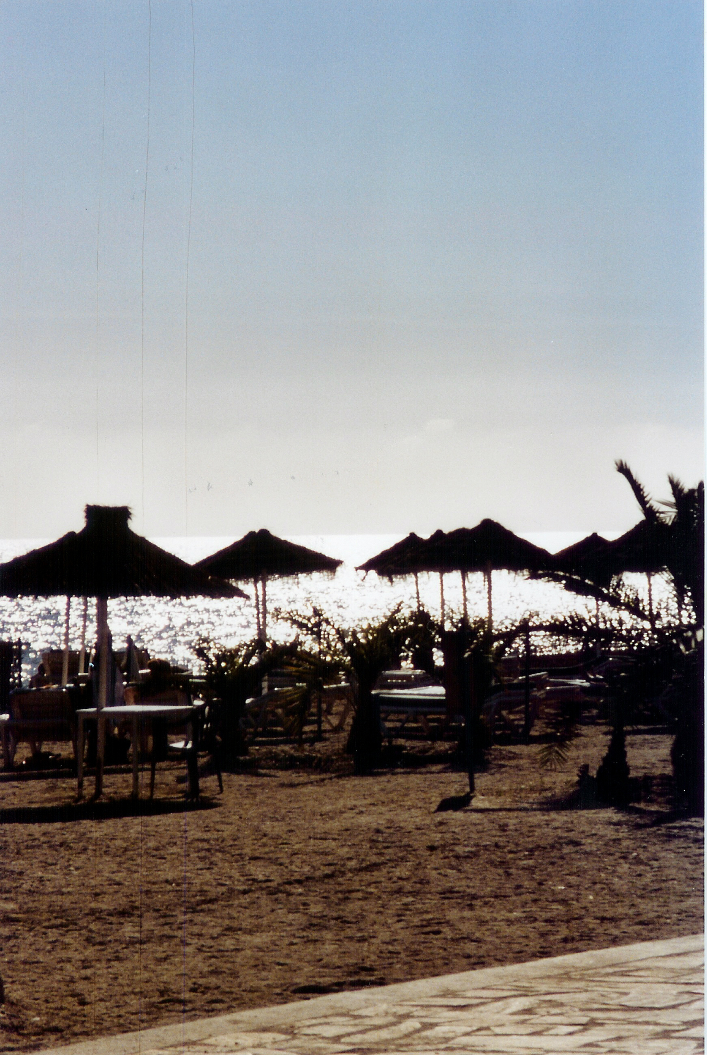 Strand von Nerja